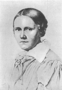 لوحة تظهر إليزابيت جروبه